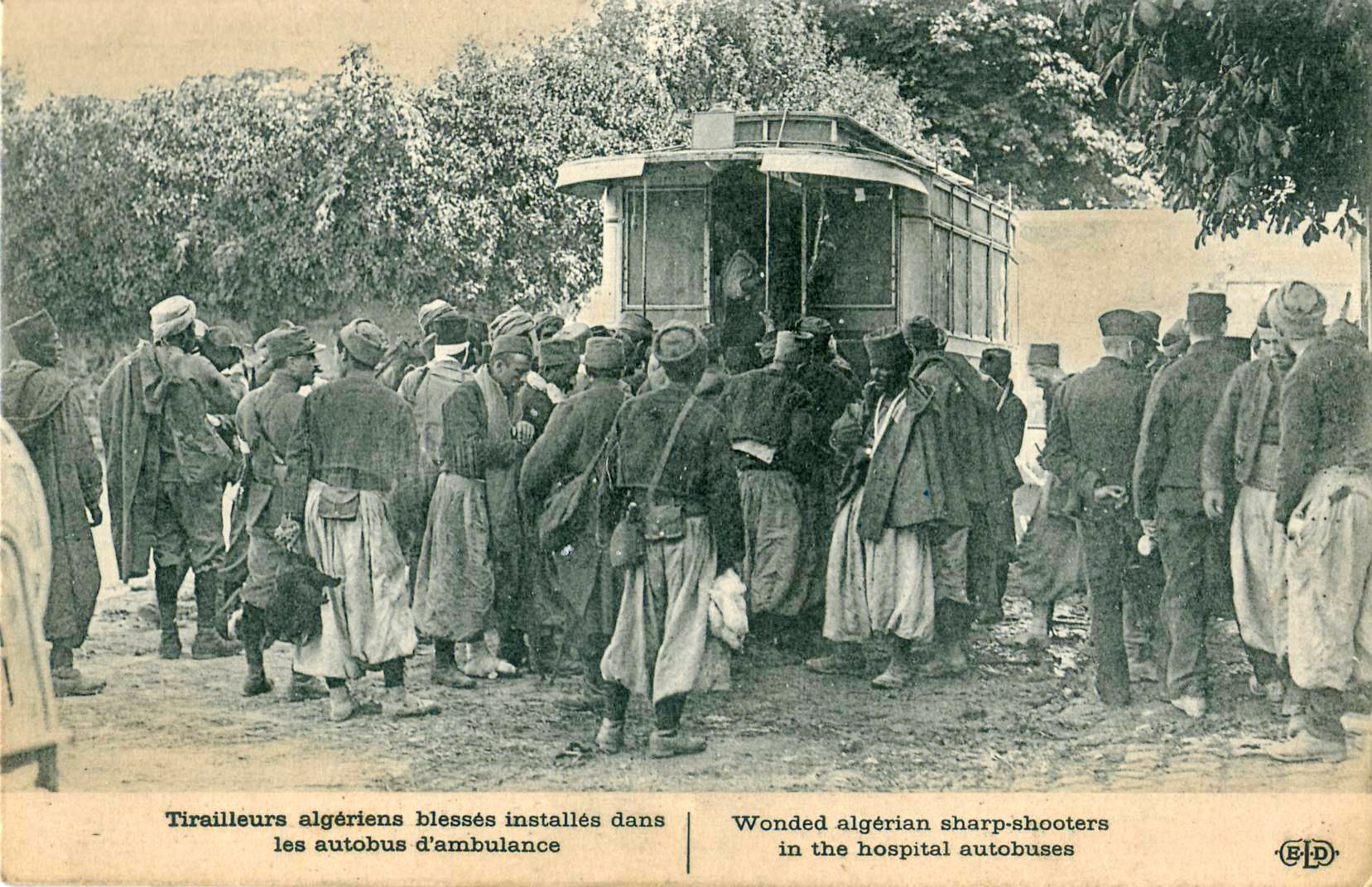 Carte postale ancienne éditée par ELD : Tirailleurs algériens blessés installés dans les autobus d'ambulance